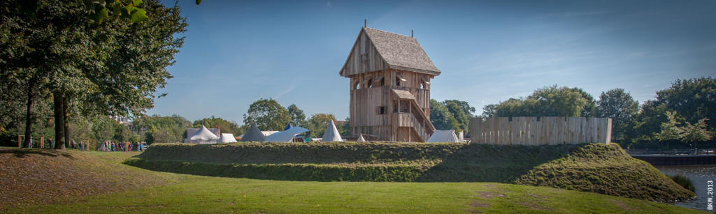 Panorama Castrum Vechtense bei den Burgmannen-Tagen 2013